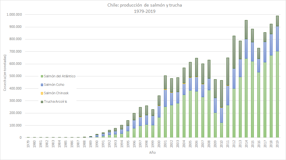 Producción chilena de salmón y trucha (1979-2019), cosecha total por año y por especie. Fuente: Anuarios estadísticos del Servicio Nacional de Pesca y Acuicultura, Chile.